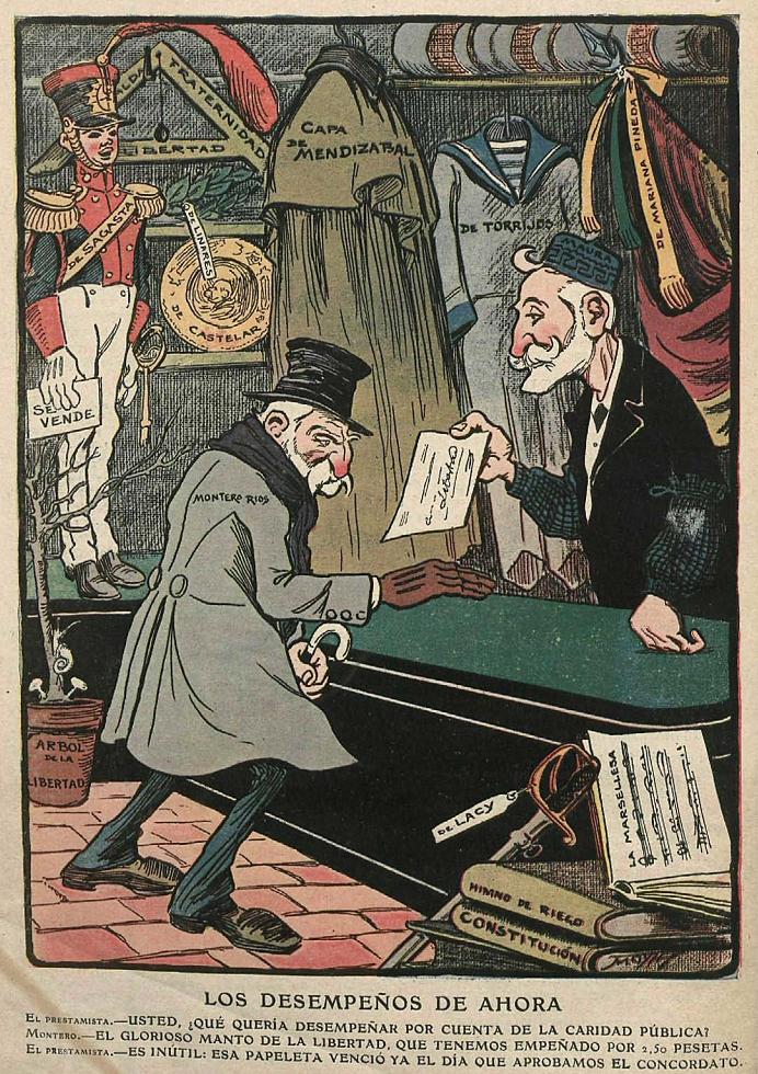 Los desempeños de ahora, en la revista satírica española Gedeón.